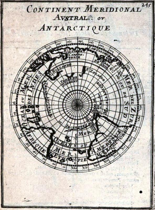 "Continent méridional austral ou Antarctique".